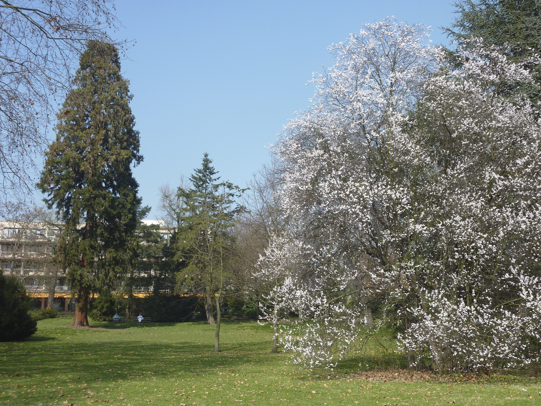 Frankfurt am Main, Bundesland Hessen, Deutschland: Der Sommerhoffpark im Stadtteil Frankfurt-Gutleut wurde im frühen 19. Jahrhundert als Englischer Landschaftsgarten eines privaten Herrensitzes des Frankfurter Bankiers und Weinhändlers Johann Noe Gogel angelegt. Im Jahr 1883 wechselte das Anwesen den Besitzer; dessen Nachname Sommerhoff blieb als Bezeichnung für den Park erhalten. Seit 1928 ist das Gelände im Besitz der Stadt Frankfurt; von den Bauten des Gogelschen Herrensitzes sind lediglich größere Teile der Umrandungsmauern des Grundstücks aus rotem Buntsandstein sowie Teile von deren schmiedeeisernen Zäunen erhalten geblieben. Das Foto zeigt eine Küstensequoia (geschätzte Höhe 25–30 Meter, links) und eine blühende Zierkirsche (rechts). Blick nach Norden; im Bildhintergrund das nördlich an den Park angrenzende Altenwohnheim